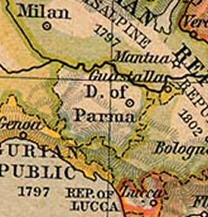 Oude kaart van het Hertogdom Parma